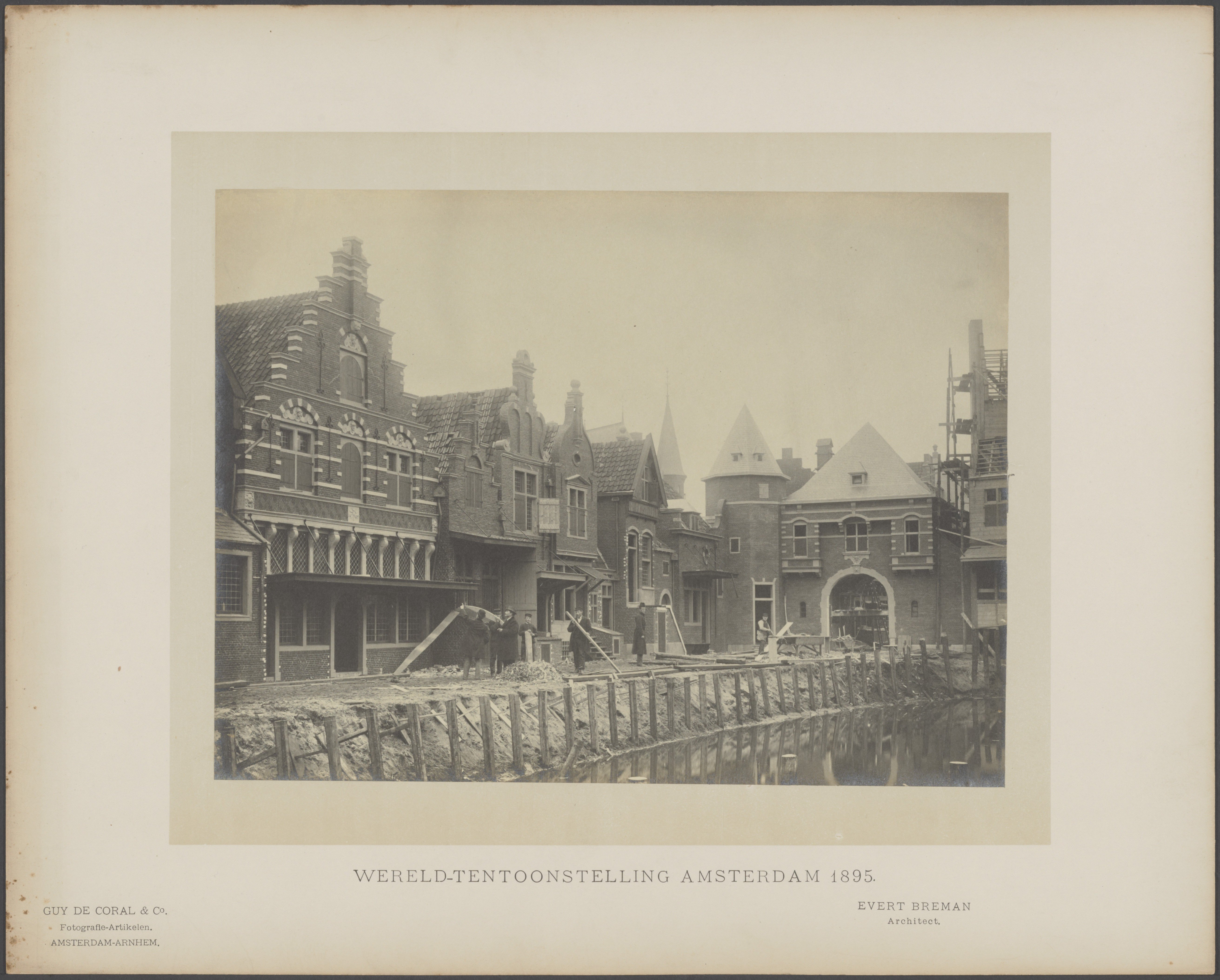 Collectie / archief : Fotocollectie Rijkswaterstaat : Metadata : Collectie / Archief : Fotocollectie Rijkswaterstaat Reportage / Serie : Wereldtentoonstelling Amsterdam 1895 Beschrijving : Rij Oudhollandse gebouwen, vrijwel gereed, en een gracht in wording. Architect Evert Breman Datum : 1895 Locatie : Amsterdam, Amsterdam, Noord-Holland, Noord-Holland Trefwoorden : gebouwen, grachten, huizen, wereldtentoonstellingen Fotograaf : Guy de Coral, J.J.M. Auteursrechthebbende : Public Domain logo Materiaalsoort : Foto (zwart/wit) Nummer archiefinventaris : bekijk toegang 2.24.11 Inventarisnummer : 11 Bestanddeelnummer : 88